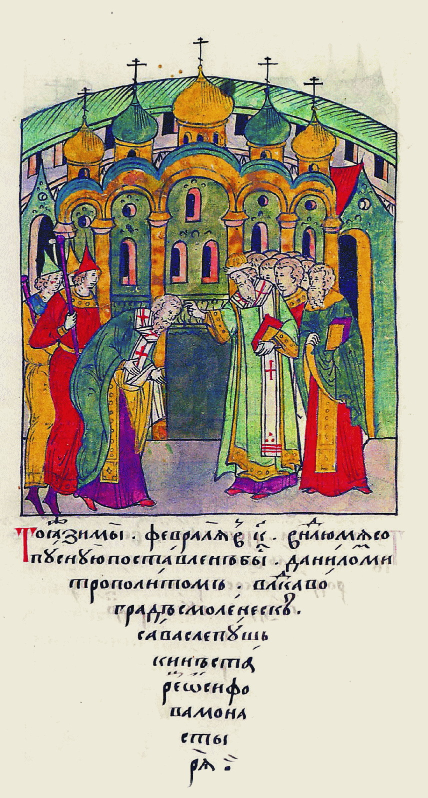 Митр. Даниил поставляет Савву (Слепушкина) во епископа Смоленского. Миниатюра из Лицевого летописного свода. 70-е гг. XVI в. (ГИМ. Син. № 962. Л. 13 об.)